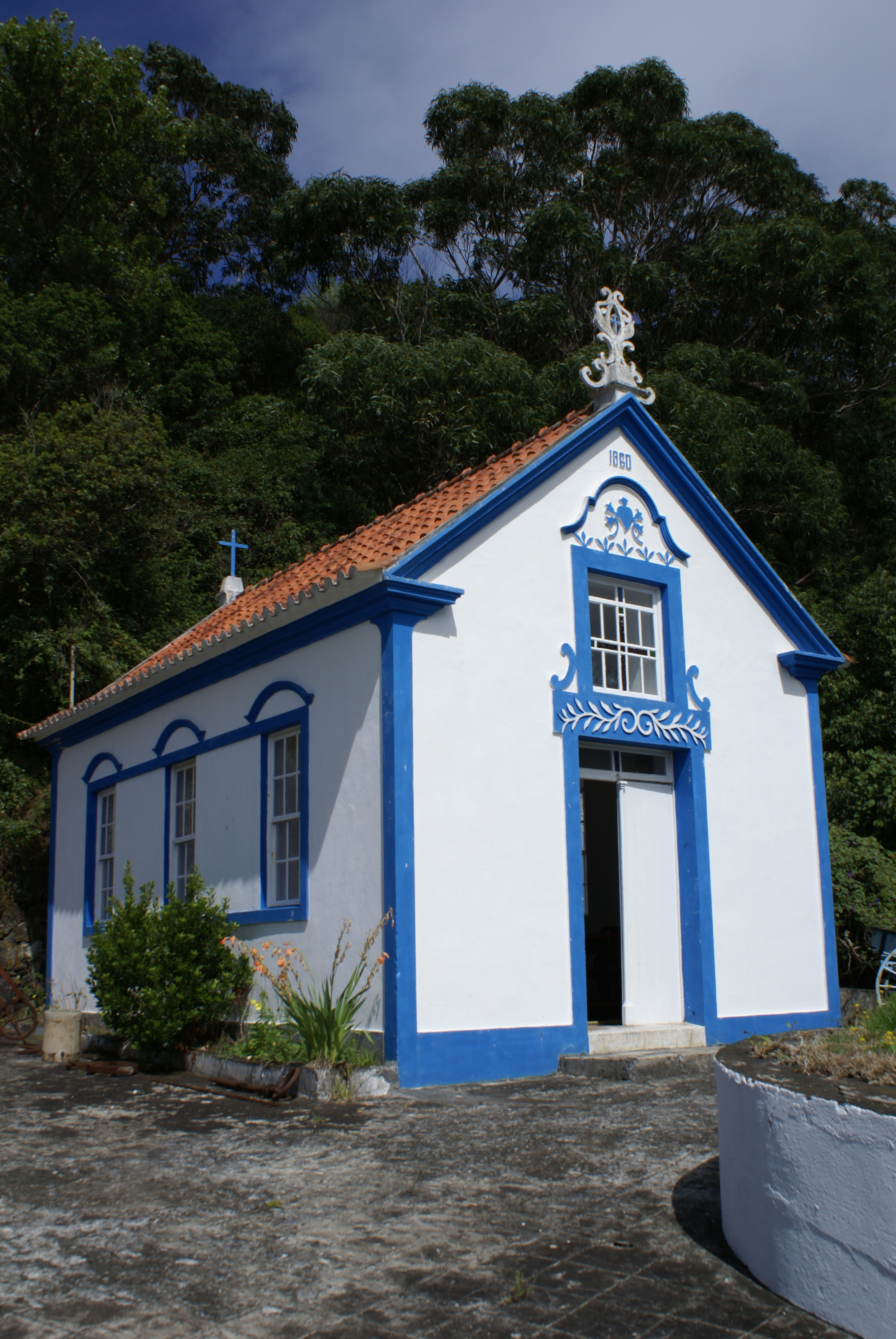 Capela da Sagrada Família, vista geral, Velas, ilha de São Jorge, Açores